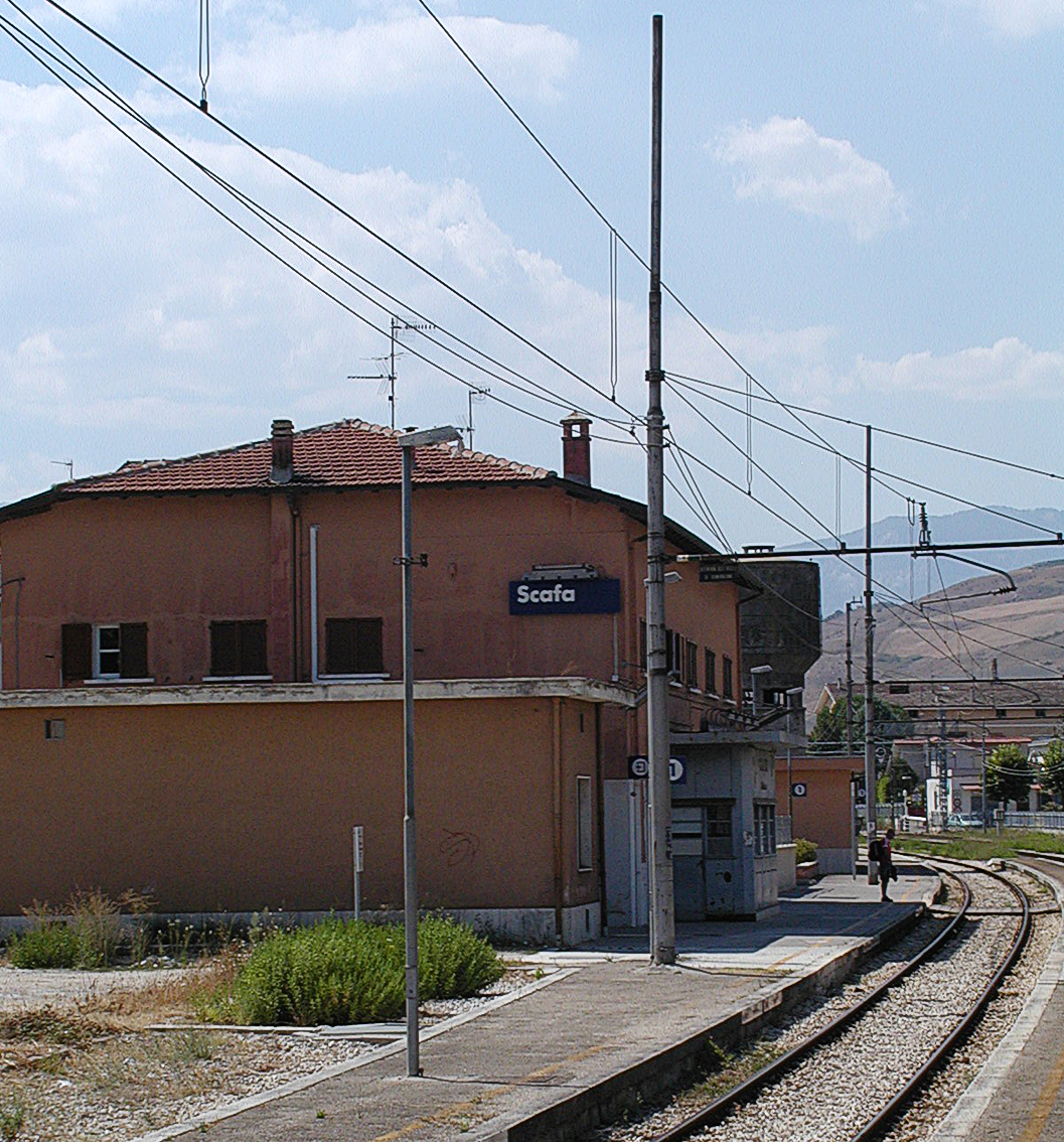 Statione di Scafa